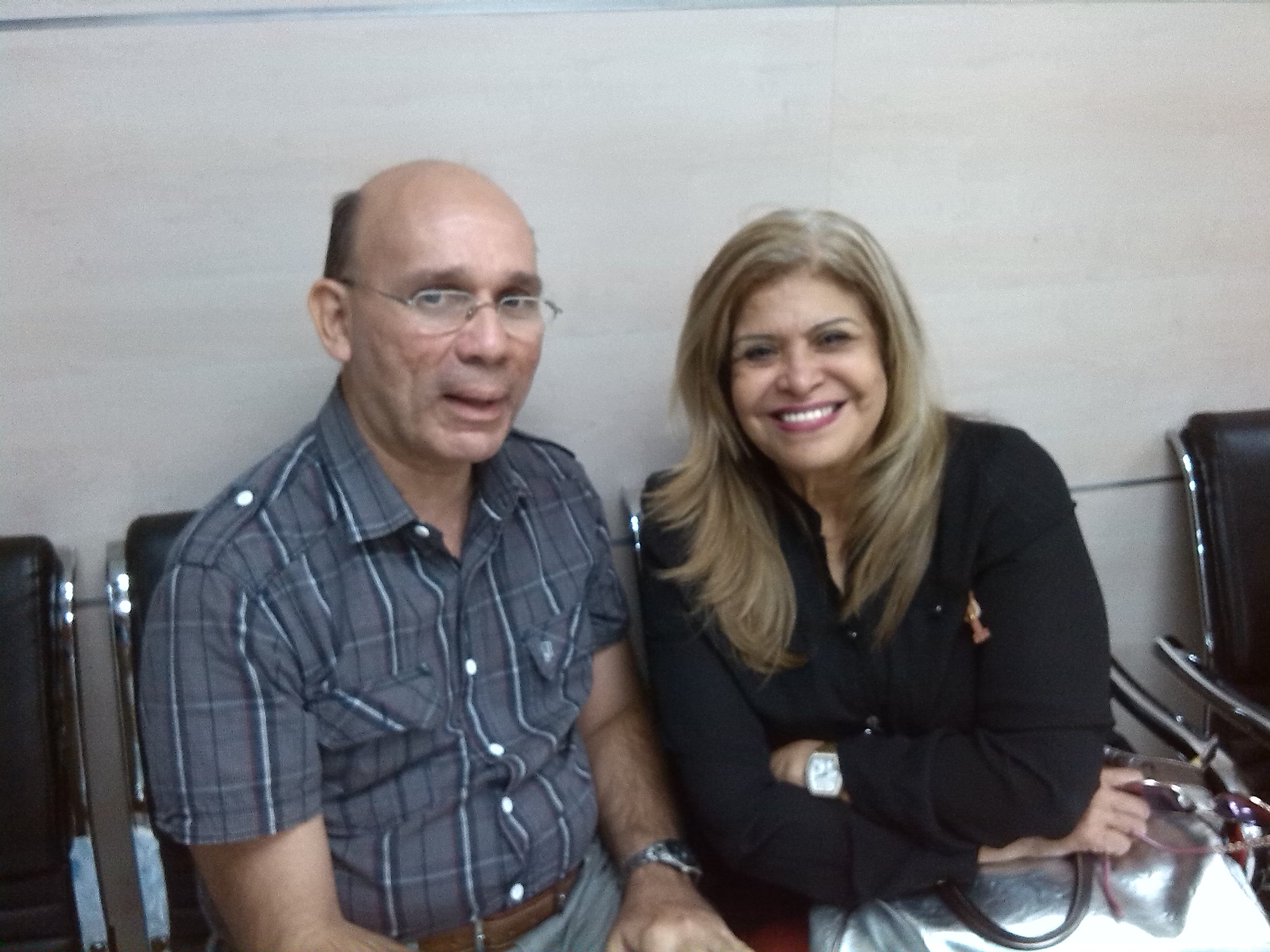 La cantante venezolana Reyna Lucero entrevistada el 19 de mayo de 2015 por un colaborador de Wikipedia.